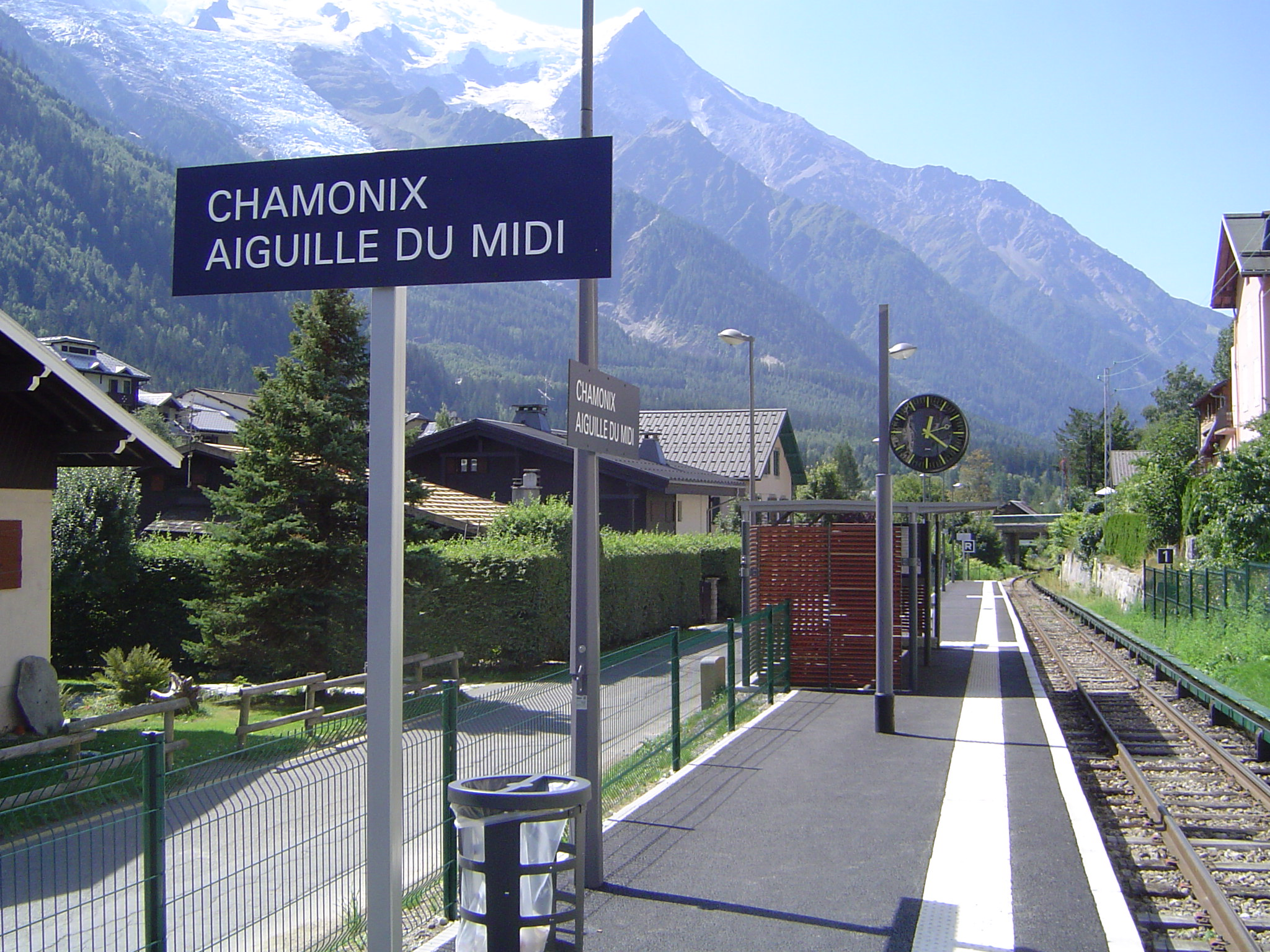 Photo de la halte SNCF "Chamonix - Aiguille du Midi" à Chamonix-Mont-Blanc (France)